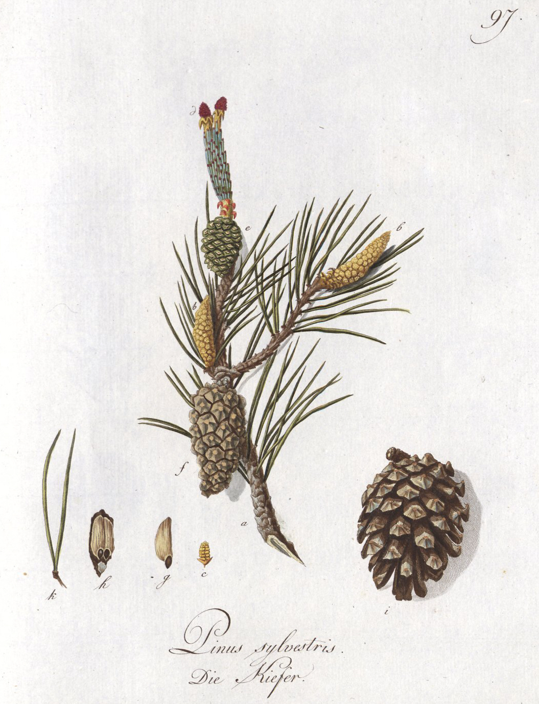 Abbildung Der Hundert Deutschen Wilden Holz-Arten Nach Dem Nummern-Verzeichnis Im Forst-Handbuch Von F. A. L. Von Burgsdorf; Tafel: Die Kiefer (Pinus sylvestris) Forche, Forle Erklärung